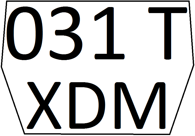 Тракторный номер Казахстана, старый общереспубликанский формат